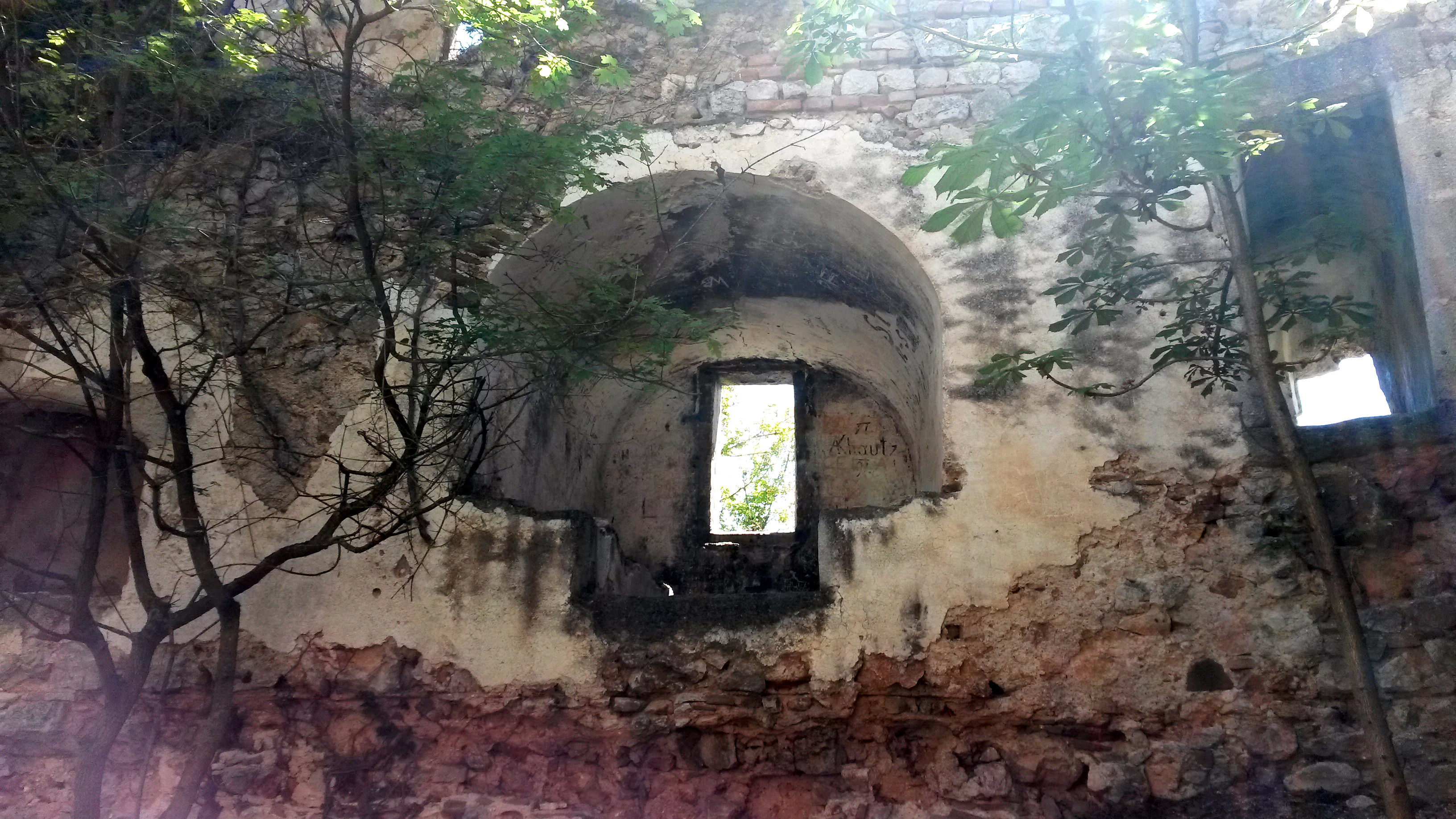 Burgruine Emmerberg (NÖ), Fensternische mit Steinbänken in der Südwand des Palas.